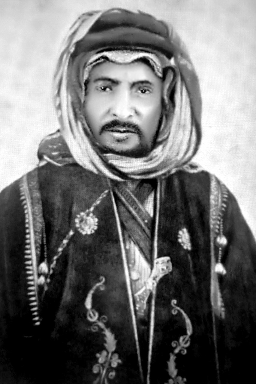 الأمير نواف بن النوري بن هزاع الشعلان أمير الجوف من عام 1909م حتى عام 1919